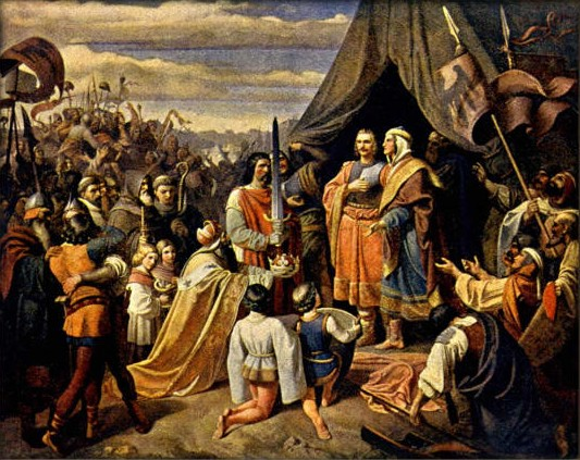 Josef Matyáš Trenkwald (1824-1897) - Přemysl Otakar I. a Vladislav III.